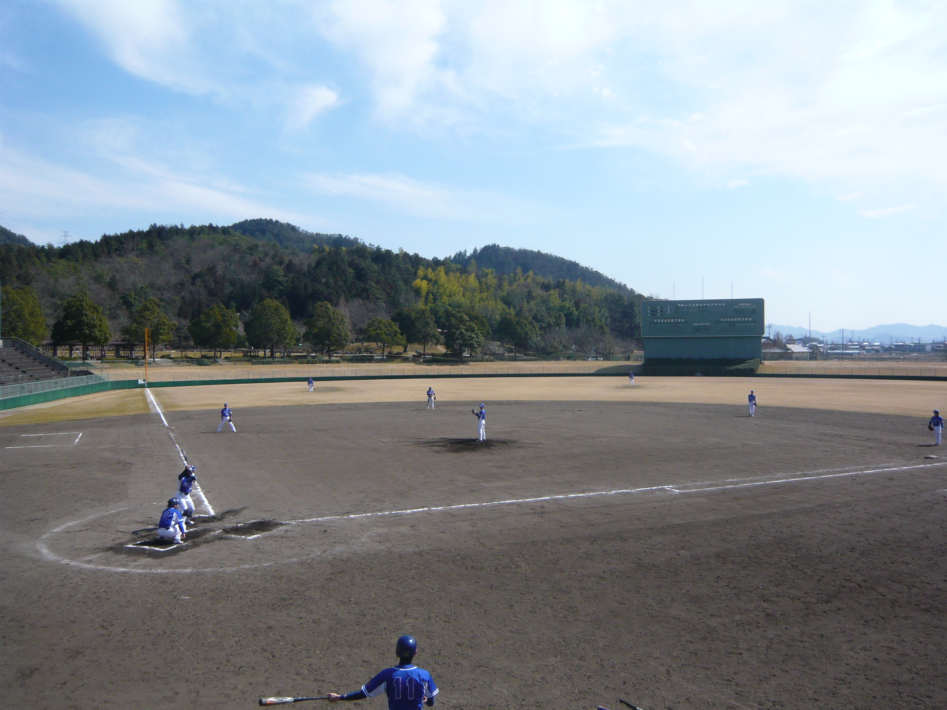 Gifu Family Park Baseball Stadium（岐阜ファミリーパーク野球場）,Gifu,Gifu,Japan（岐阜県岐阜市）で撮影。